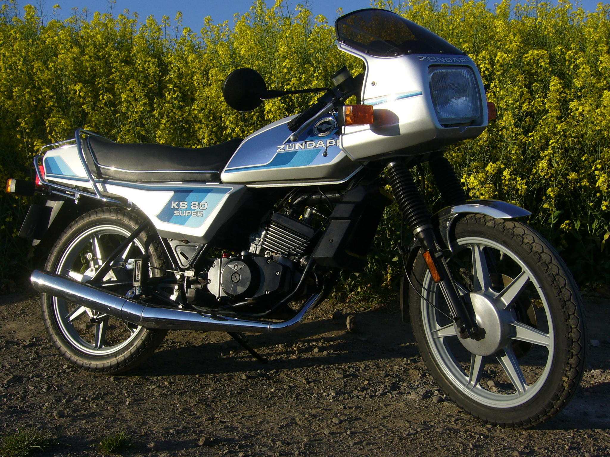 ZÜNDAPP